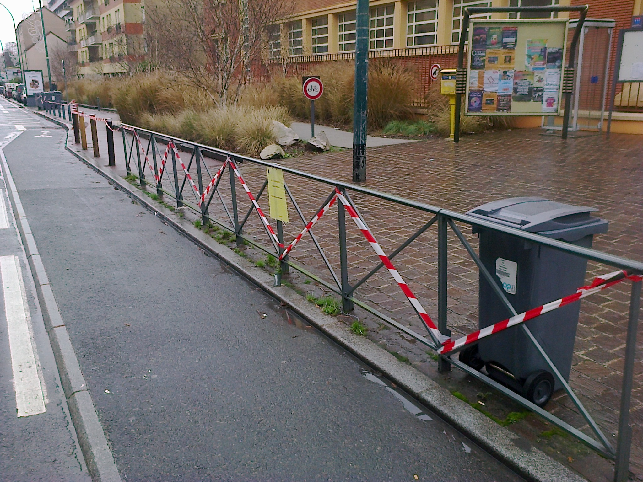 Dispositif d'interdiction de stationnement devant l'école Ferdinand Buisson à Chaville le 9 janvier 2015 suite aux attentats contre la rédaction de Charlie Hebdo.